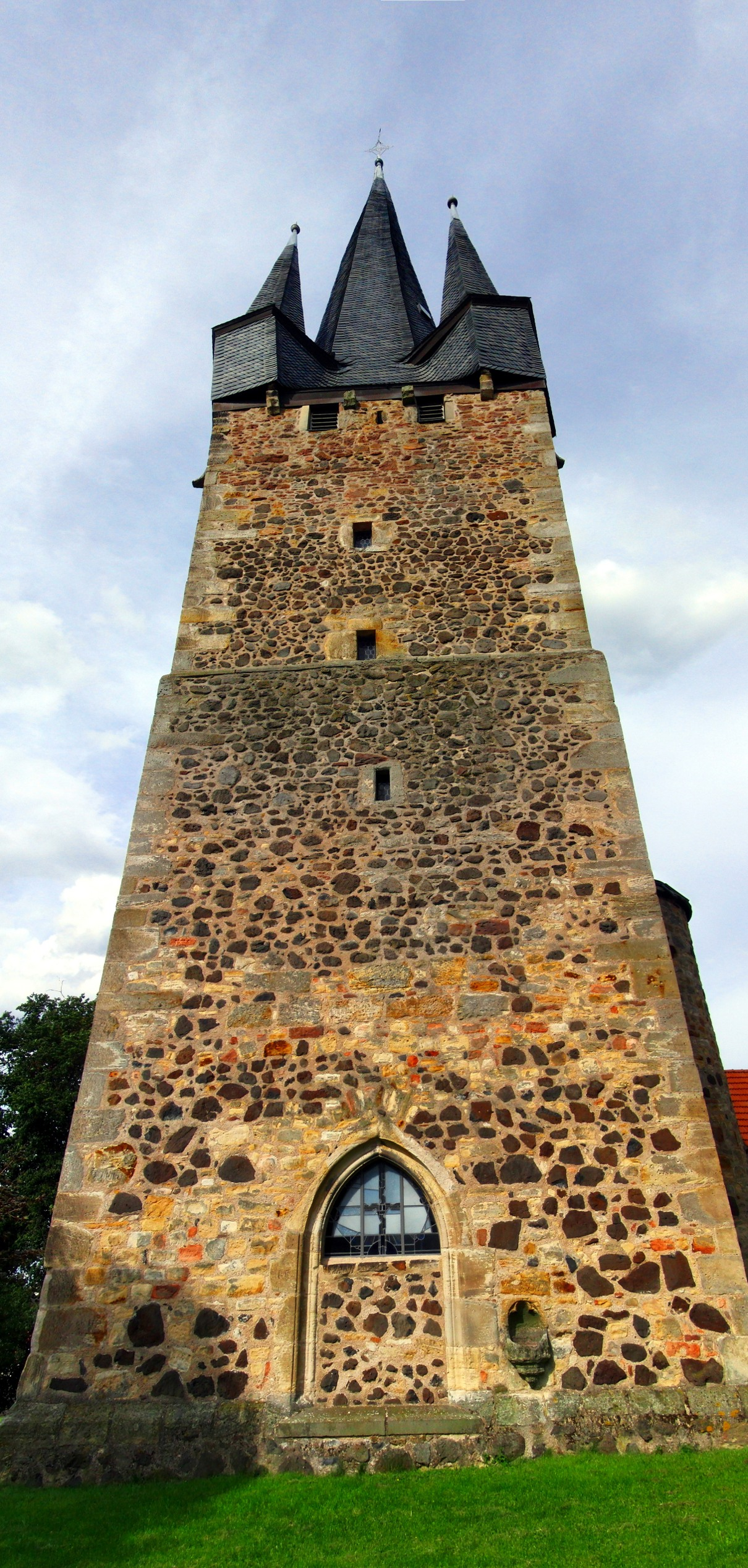 Turm der ev. Dorfkirche in Harle (Wabern)